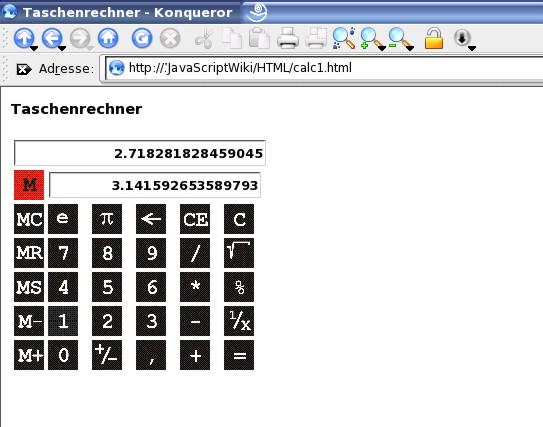 JavaScript - Taschenrechner